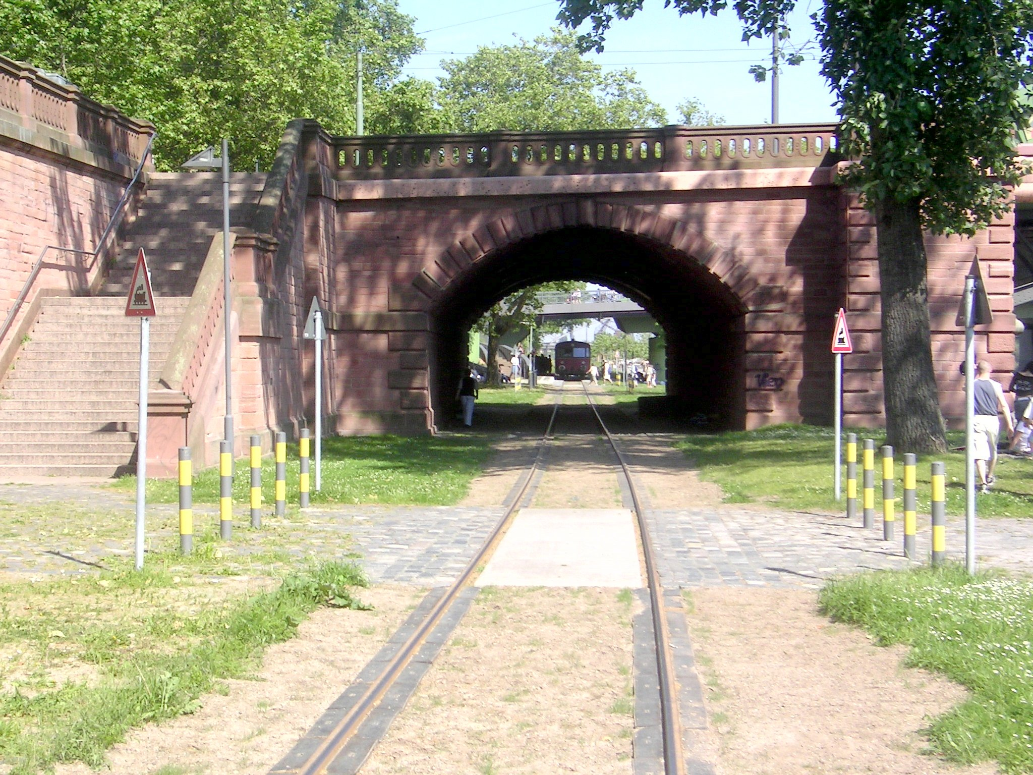 Verbindungsbahn (Frankfurter Hafenbahn) unterquert die Ignatz-Bubis-Brücke am Ufer des Mains